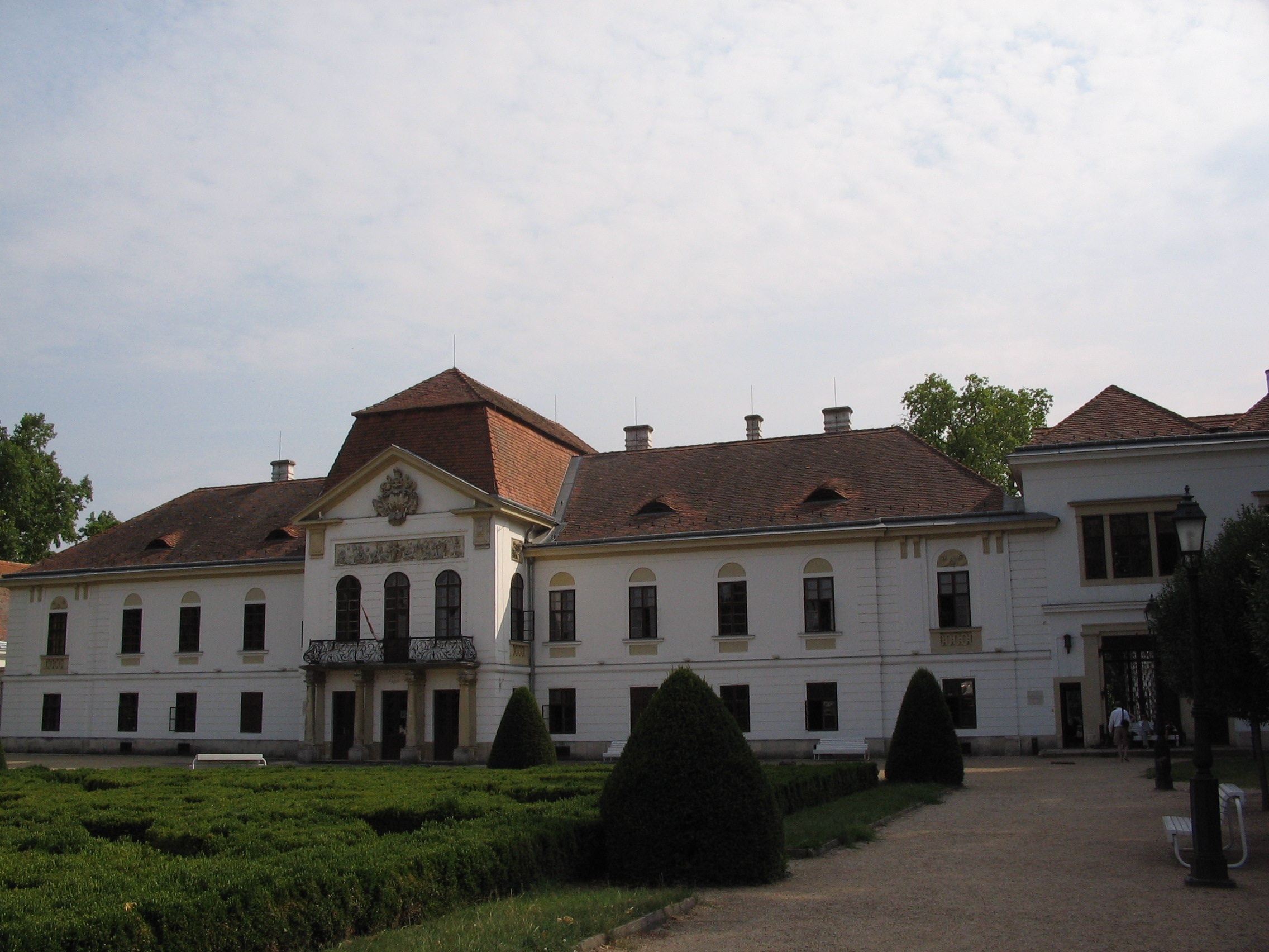 A nagycenki Széchenyi-kastély főbejárata